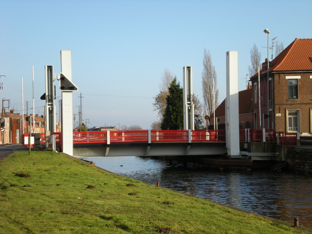 Pont mobile de Râches